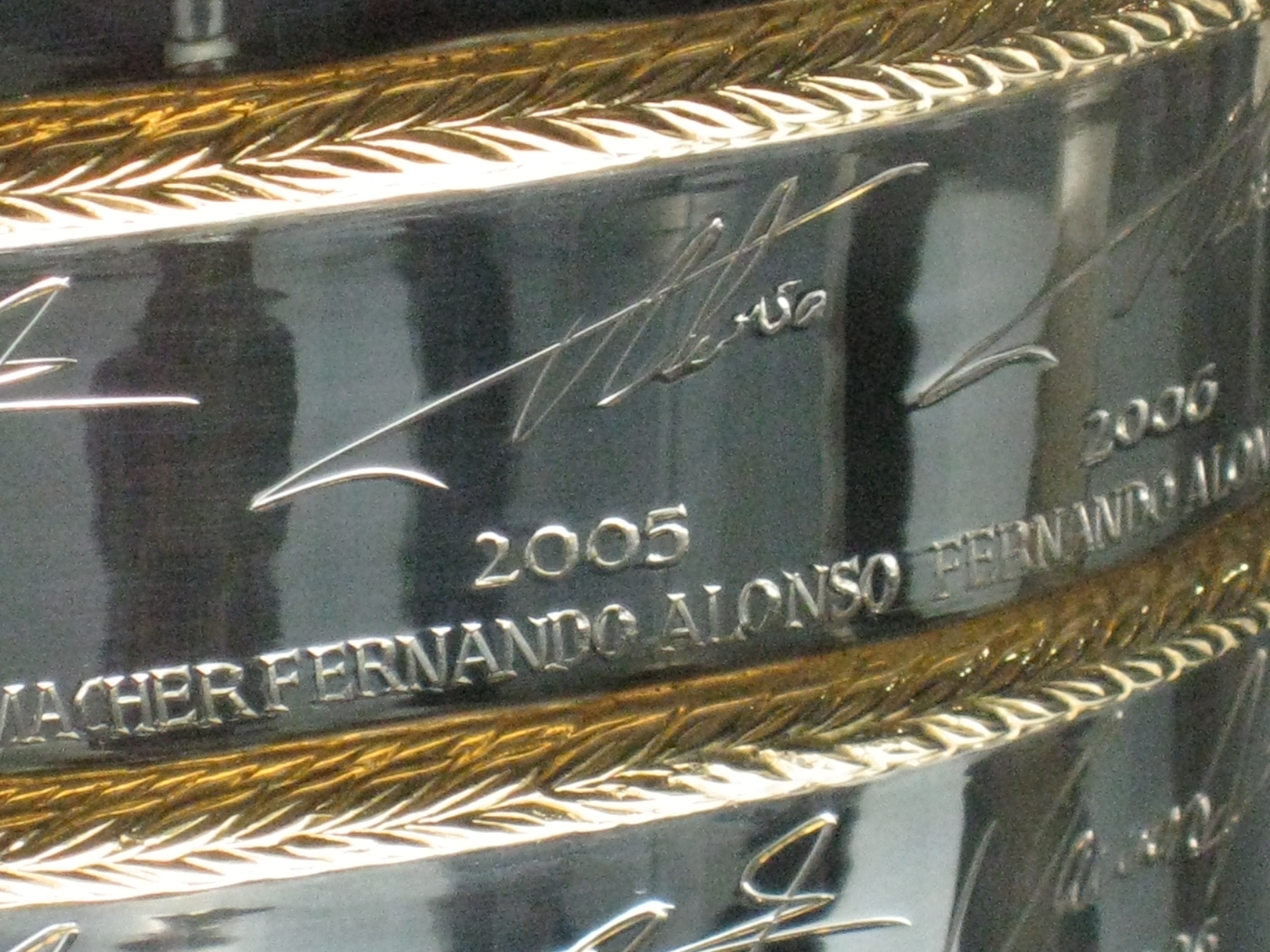 Copa de la FIA de campeón del mundo, detalles de las firmas de los diferentes campeones del mundo en la copa